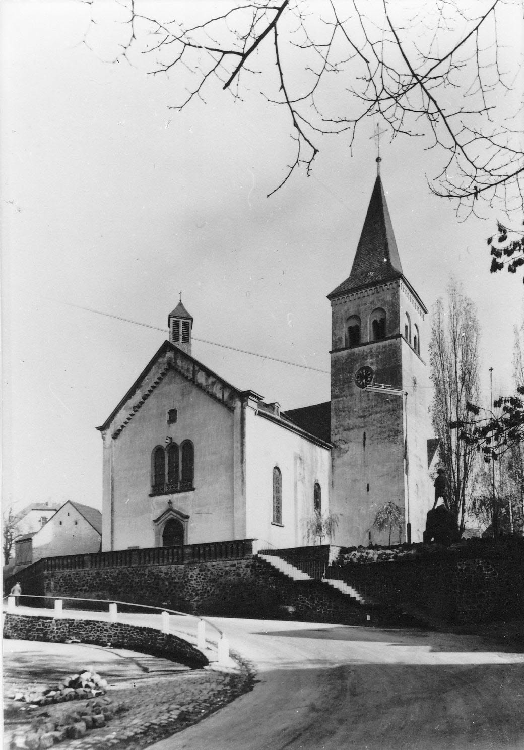 Vorgängerkirche in Ochtendung zwischen 1851 und 1958, Aufnahme von der Hauptstraße aus in Blickrichtung Koblenz